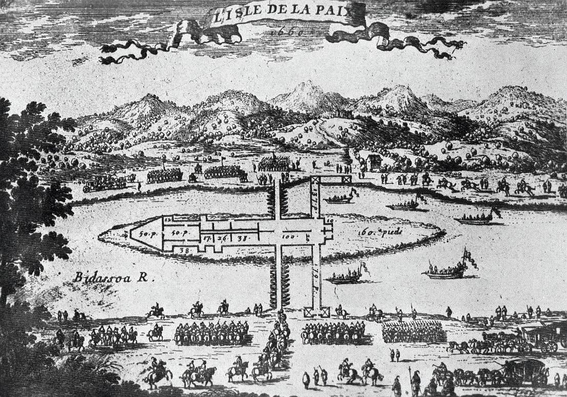 L'Ile de la Conférence en 1660 (gravure du temps).